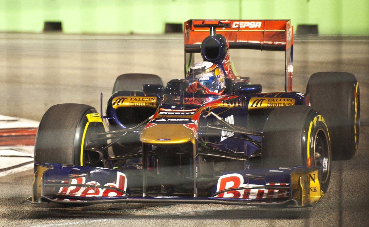 Buemi at practice Singapore 2011